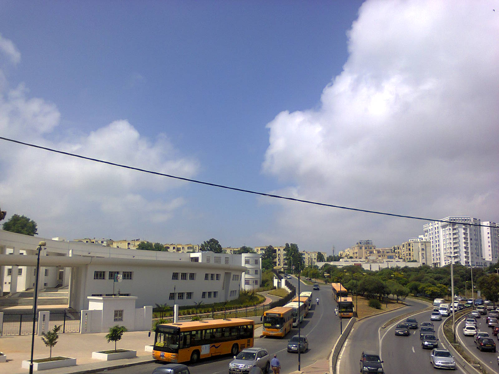 Lycée National de Mathématique de Kouba, au quartier de Garidi.